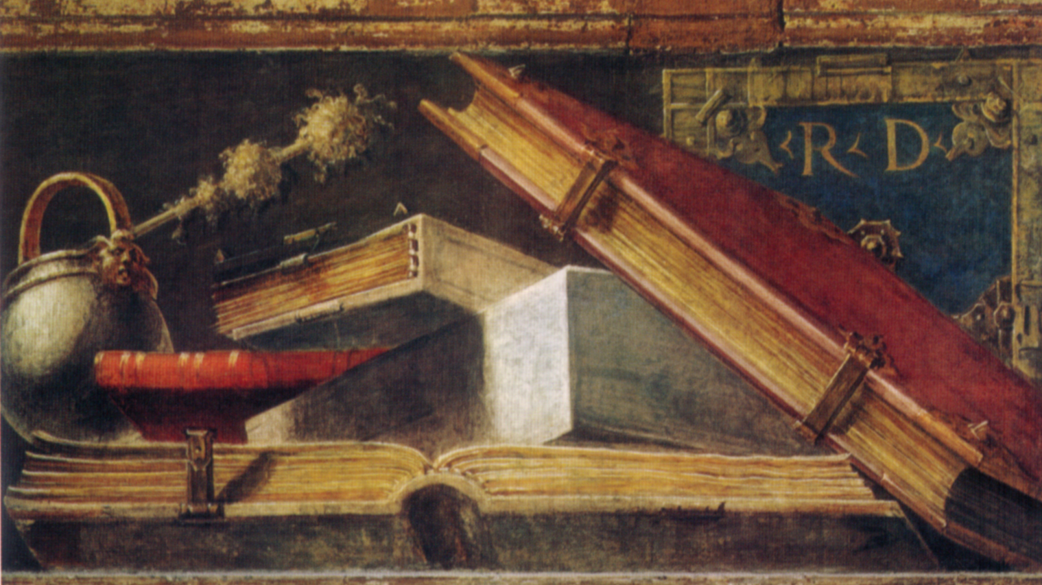 detail